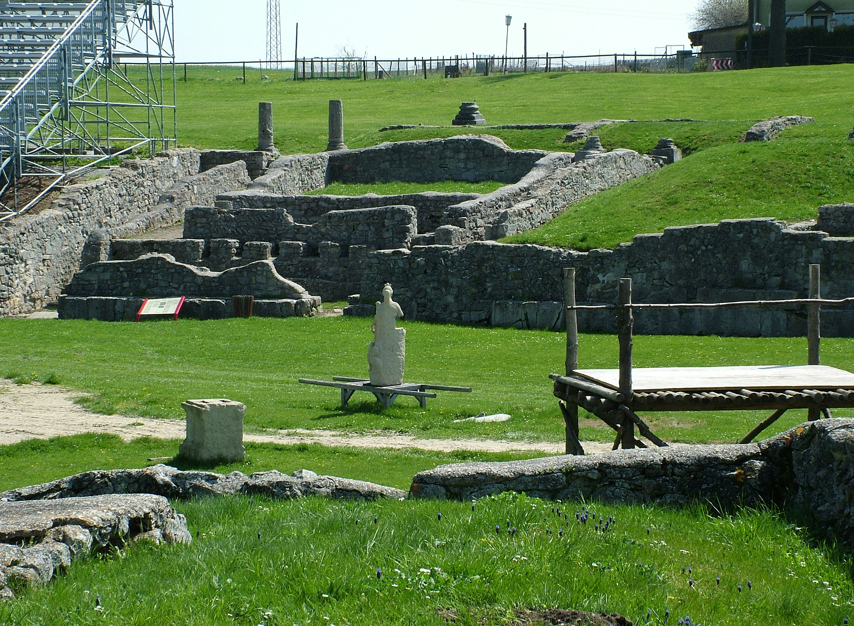 Carnuntum, légiós amfiteátrum (Bad Deutsch Altenburg, Ausztria)